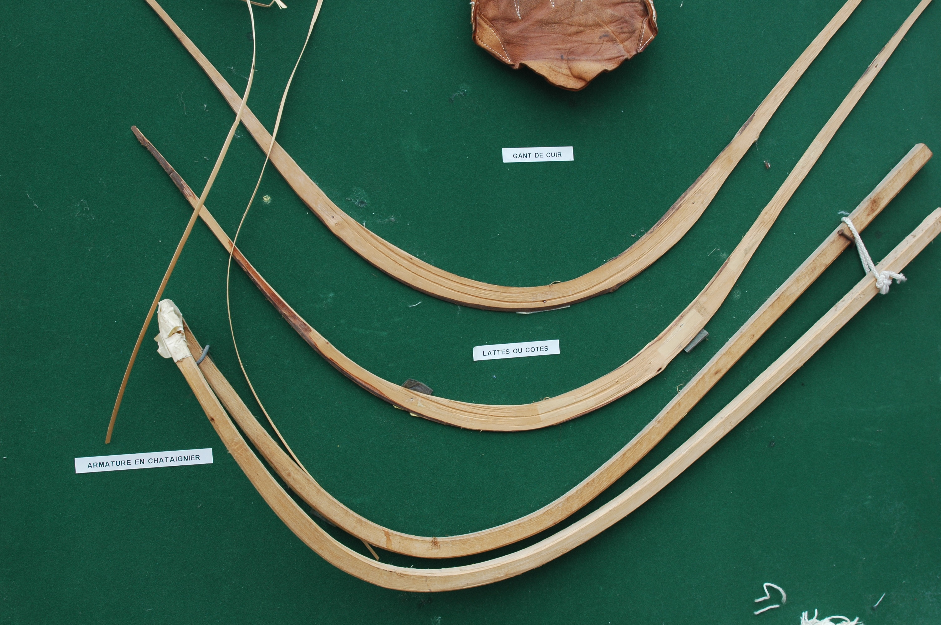 Grand chistera, armature en chataignier. Photo prise le 01/08/06 par Harrieta171